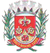 Brasão da cidade de Mairi